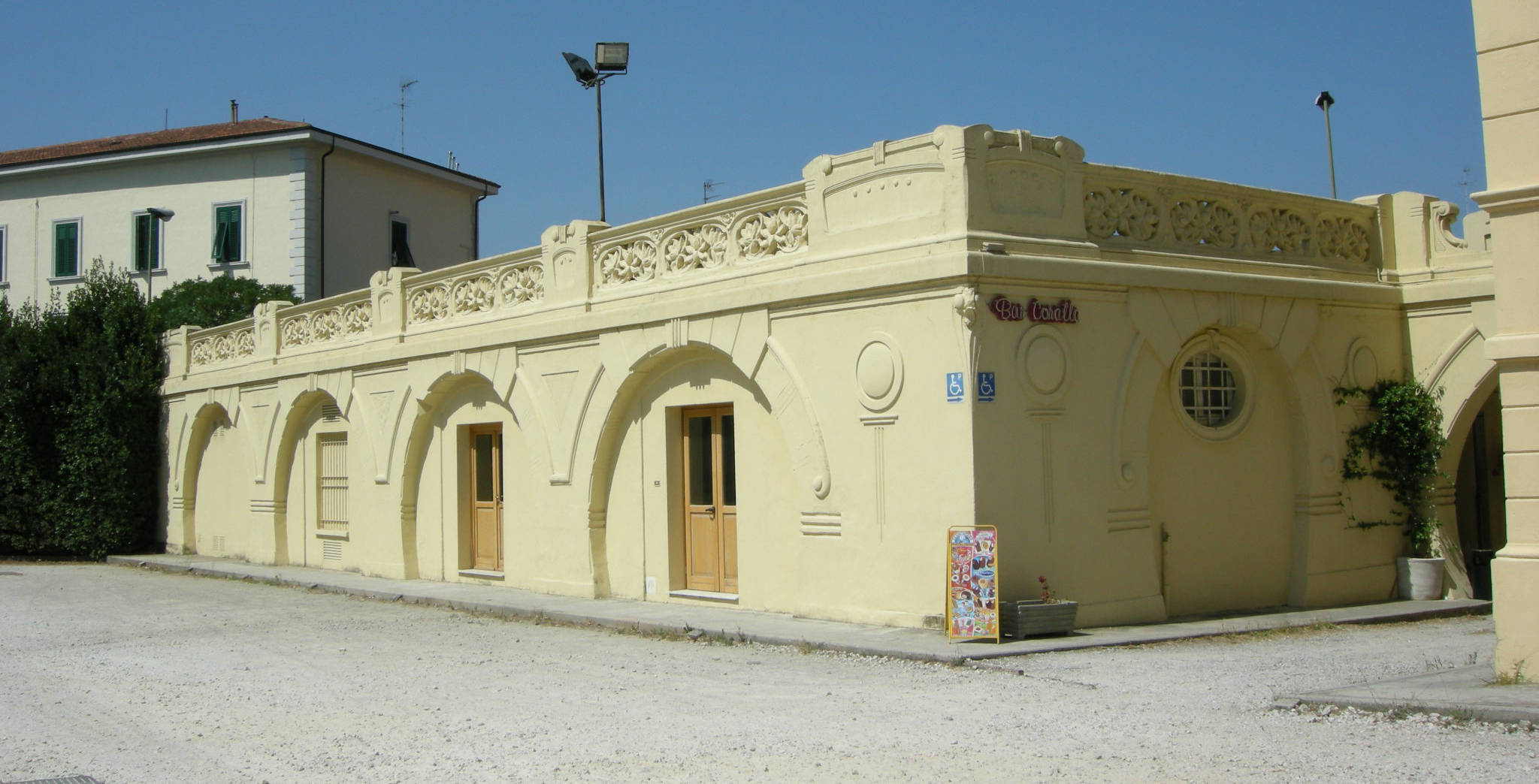 Grand hotel corallo, bar